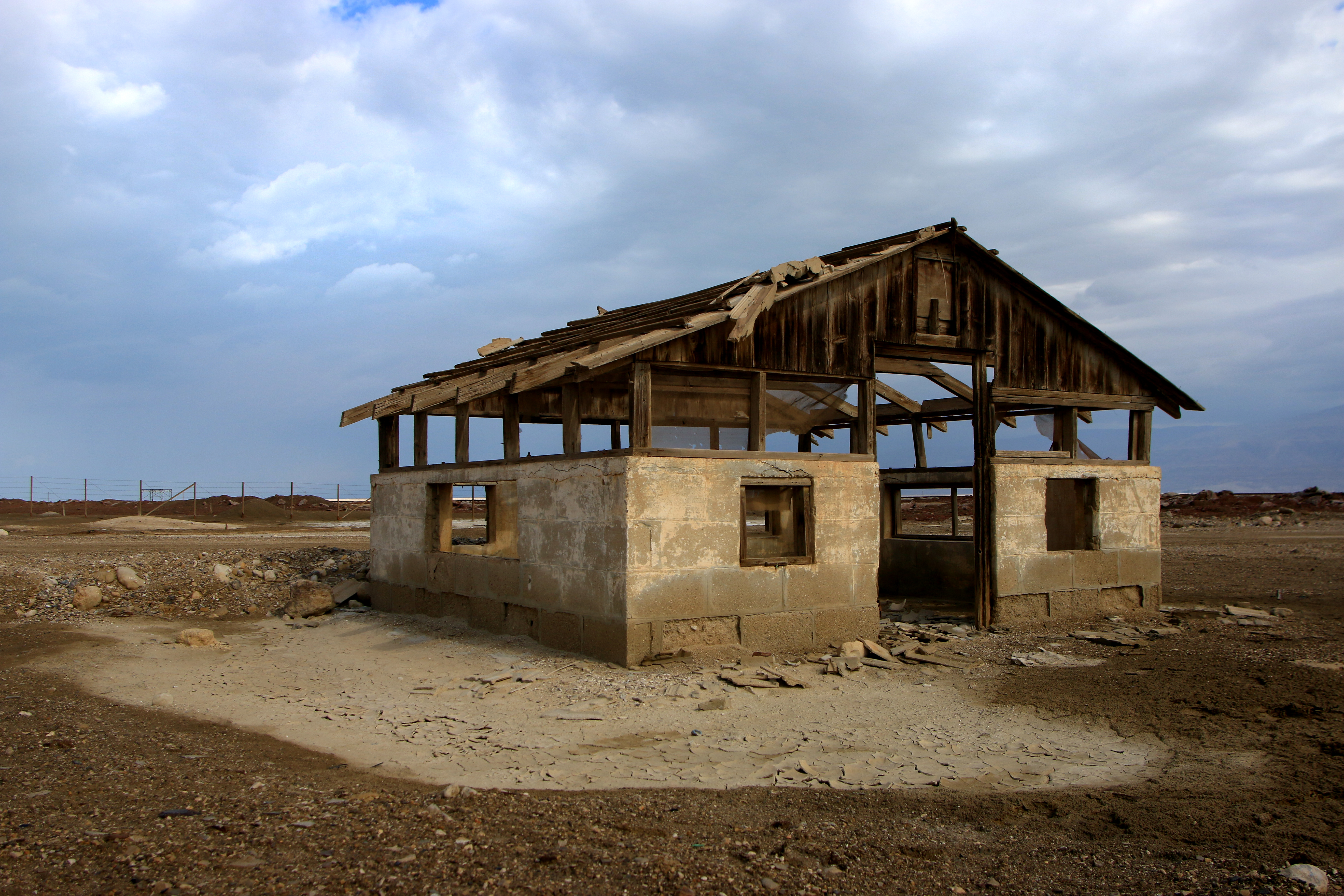 מפעל המלח בסדום או בשמו הידוע יותר "מחנה העובדים בסדום" של חברת האשלג, הינו המפעל הדרומי והמאוחר מבין שני המפעלים שהוקמו לחופי ים המלח לפני קום המדינה. המפעל הוקם בשנת 1934 באגנו הדרומי של ים המלח ביחד עם מחנה העובדים שלרגלי הר סדום על ידי משה נובומייסקי והמהנדס הבריטי תומאס גריגורי טולוק.